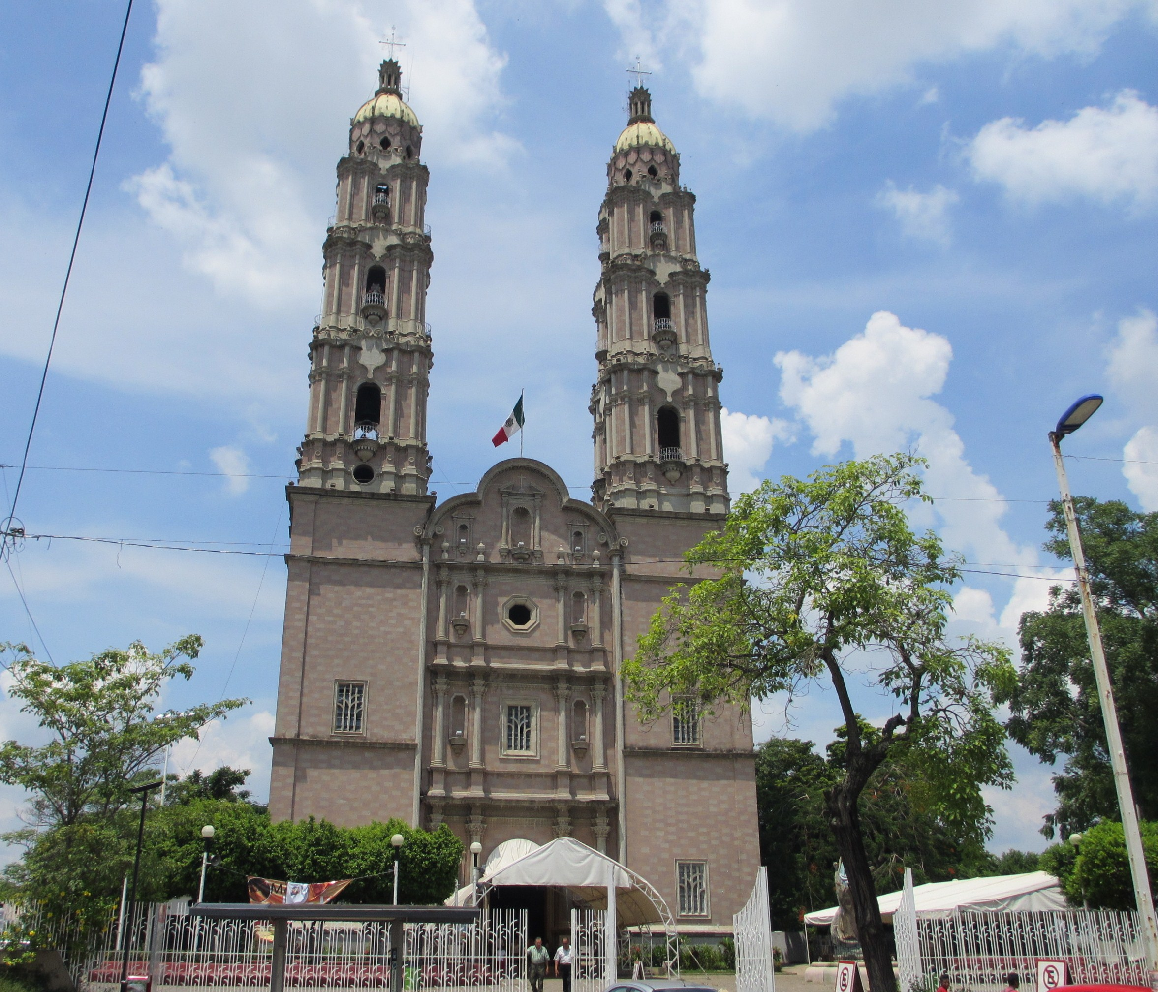 Catedral del Señor de Tabasco. Ciudad de Villahermosa, Tabasco, México.